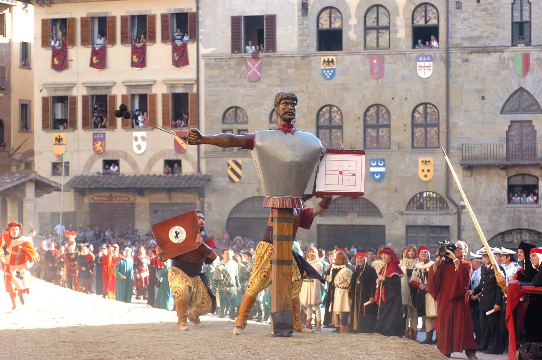 I due Famigli pronti ad arrestare l'impetuosa azione del Saracino (Buratto) appena colpito dalla lancia di un cavaliere, Giostra del Saracino, Arezzo, Italy